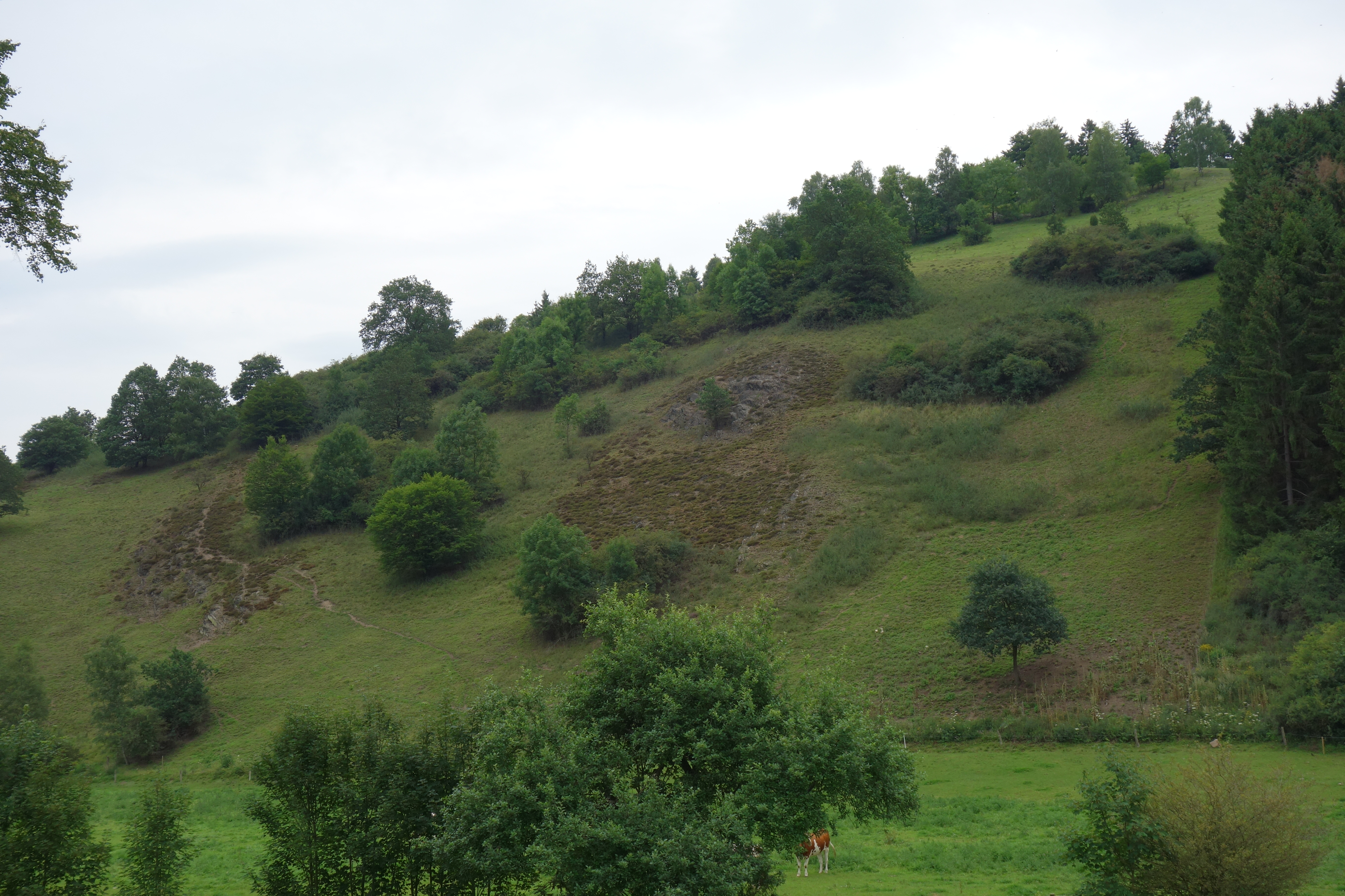 Naturschutzgebiet Wulsenberg; westliche Bereich bei Freizeithütte.